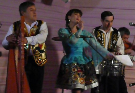 Alfredo Levano (Hilario), Monica Sanchez (Sally), Luis Fernando Hidalgo (Pitin) y Oswaldo Salas (Pepito) durante la grabacion de una escena de la miniserie peruana "Sally, la muñequita del pueblo"